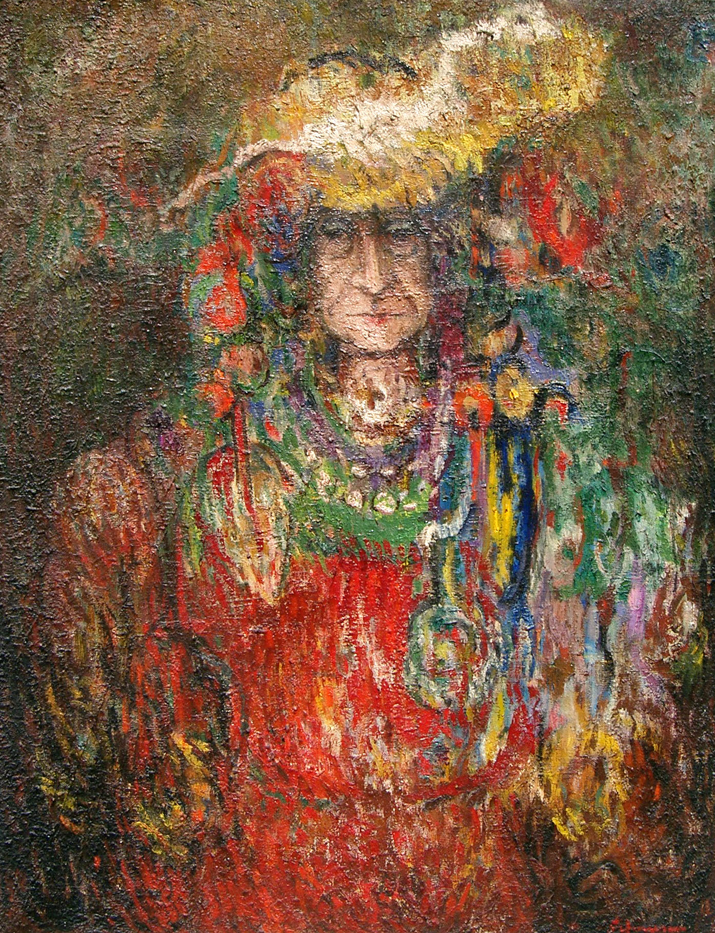 Madame Lucia Sturdza Bulandra in "La Folle de Chaillot" von Jean Giraudoux, Bild von George Ştefănescu, 1967, Ölfarben/Leinwand,93x72 cm, privat Sammlung Radu Ştefănescu, Bukarest Rumänien.